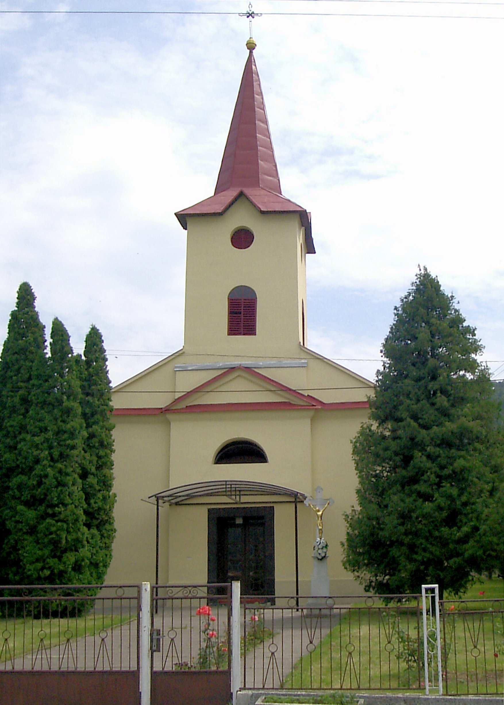 Turany nad Ondavou, Rímskokatolícky kostol Svätá Anna